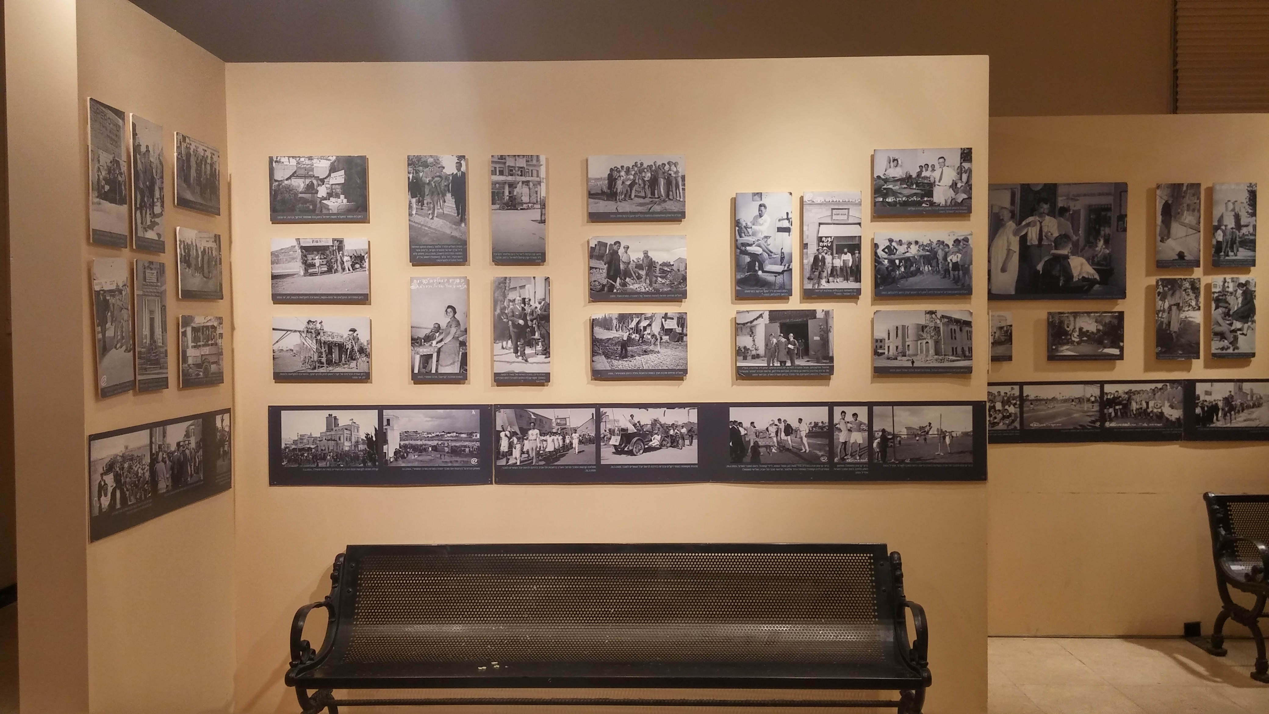 קטע מתערוכת הצילומים של שמעון קורבמן במגדל שלום